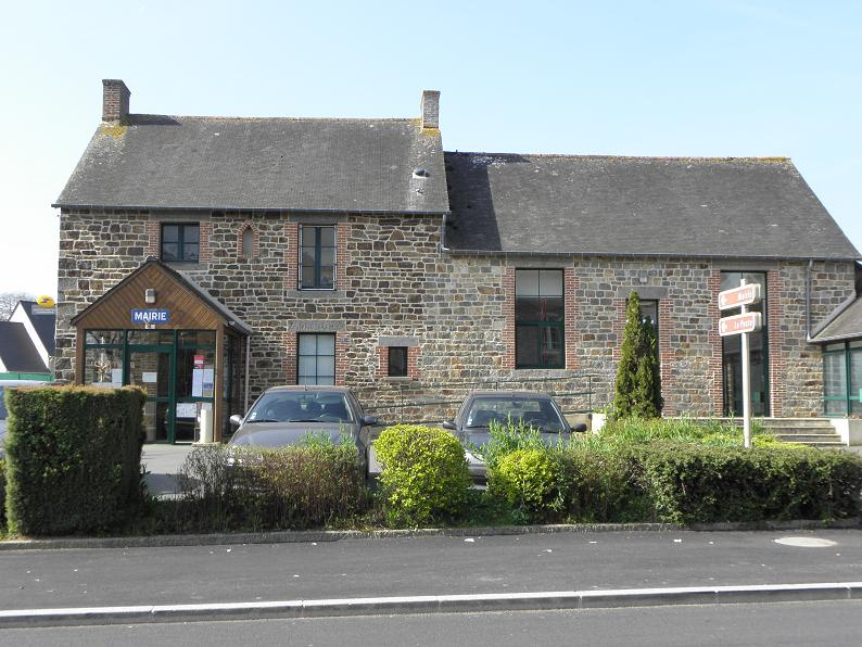 Mairie de Marcillé-Raoul (35).